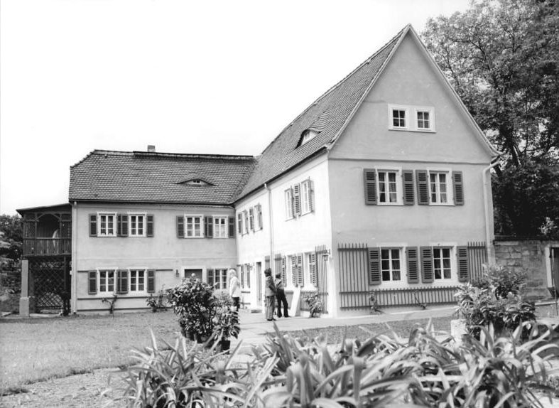 Dresden, Weber-Haus ADN-ZB Häßler 3.6.1976 Dresden: Die einstige Wirkungsstätte Carl Maria von Webers wurde am 3.6.1976 nach zweijährigen Rekonstruktionsarbeiten der Öffentlichkeit als Gedenkstätte wieder übergeben. Das Weber-Haus in Hosterwietz am Stadtrand von Dresden wurde anläßlich der Carl-Maria-von-Weber-Tage (3.6. - 6.6.1976) fertiggestellt. Nach dem Umbau sind jetzt Konzerte im Haus und im Garten möglich.